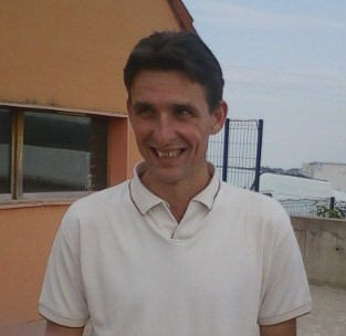 Guillaume Warmuz à Mercurey lors d'un tournoi de jeunes (U9, U11 et U13)